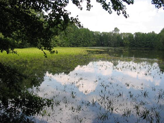 Pfefferfließ-Flachsee an der Klinkenmühle, Brandenburg